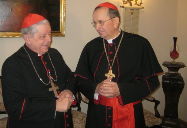 Prymas Senior Józef Glemp z lewej oraz nowy Prymas Henryk Muszyński